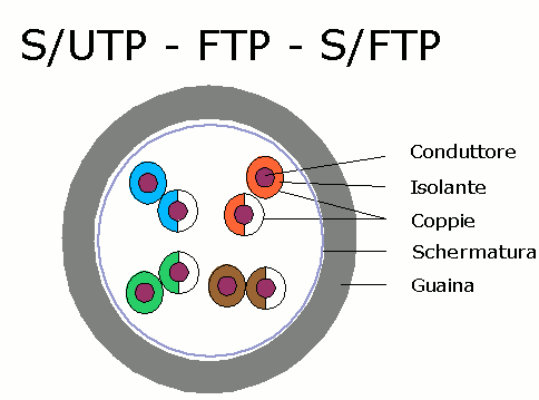 Struttura di un cavo UTP (Traduzione)